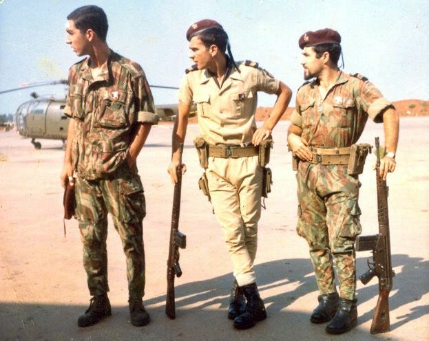 O alferes miliciano comando Briote (à esquerda), na base aérea de Bissalanca, em Bissau, juntamente com o Furriel Azevedo (ao centro) e o Sargento Valente (à diereita). Foto de 1965 ou 1966.